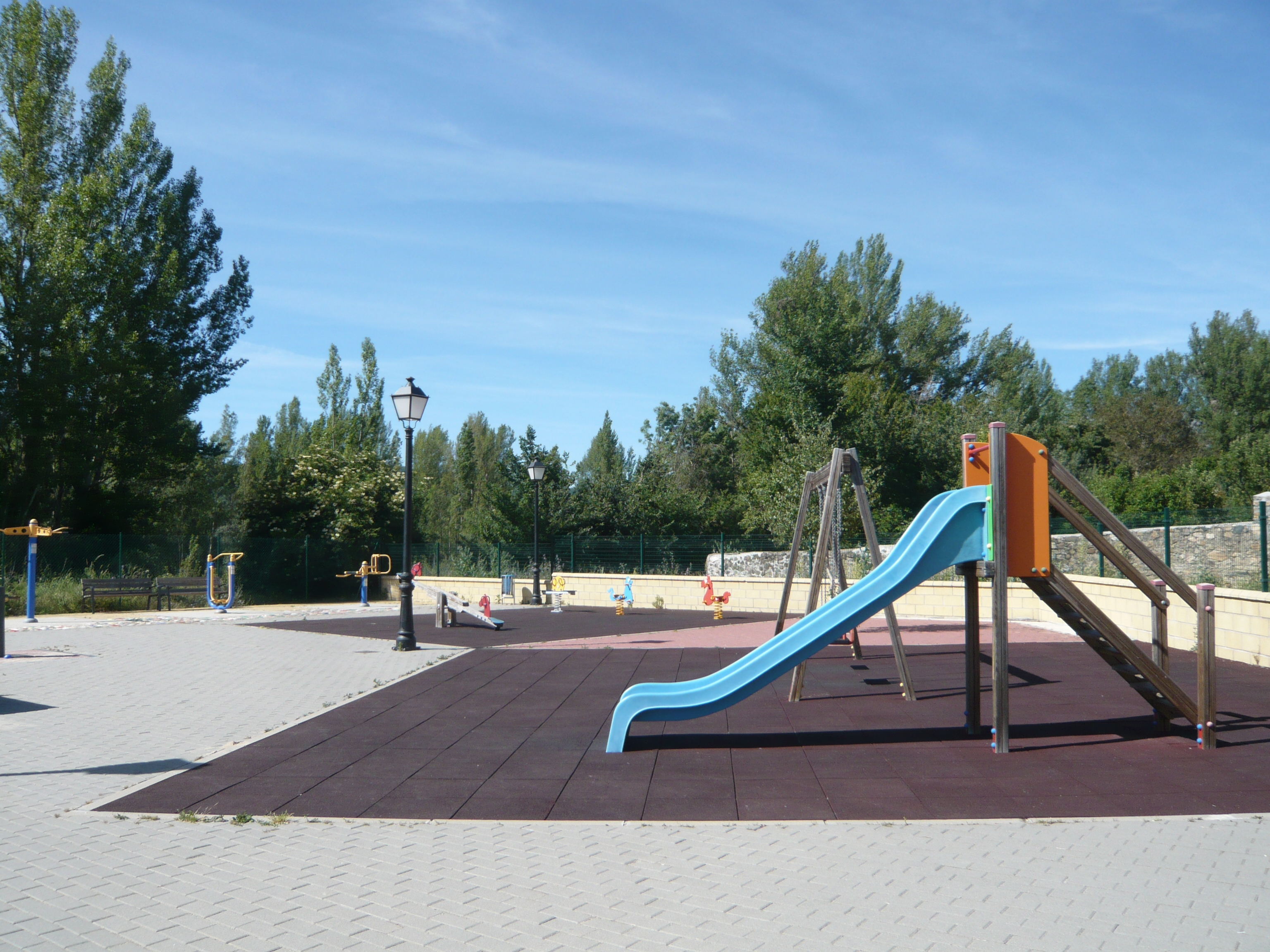 Parque infantil de Vidanes